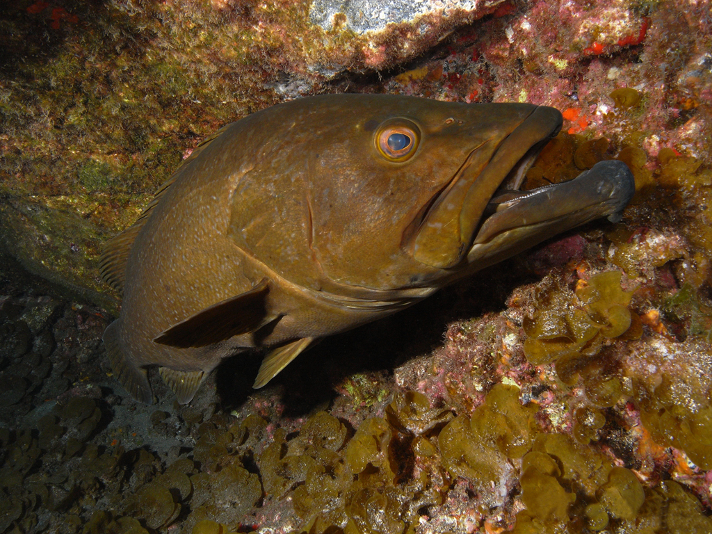 Mycteroperca fusca - Island-grouper / Abade / Mérou d'île, el Hierro.